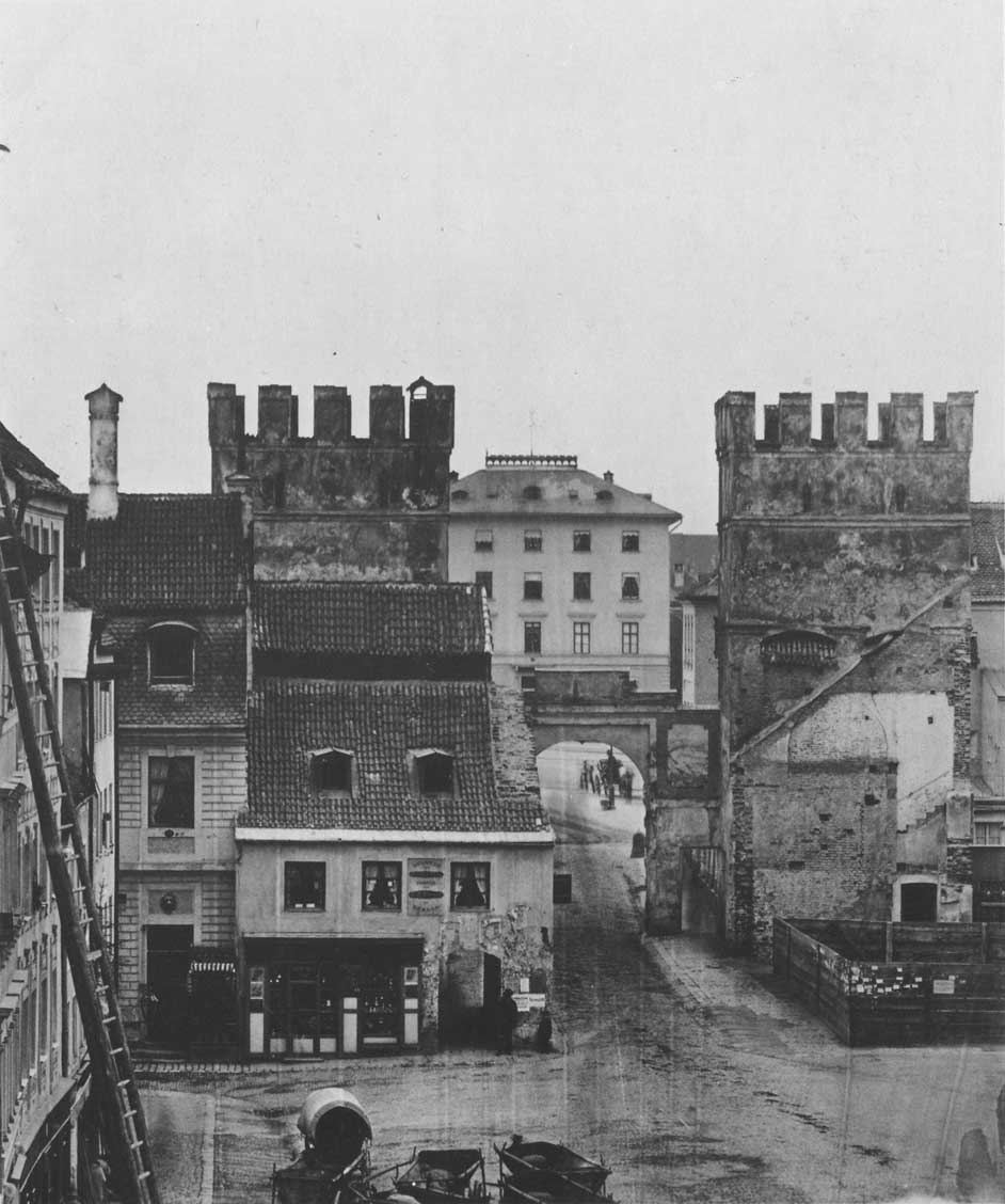 Das Karlstor nach Abbruch des Hauptturmes